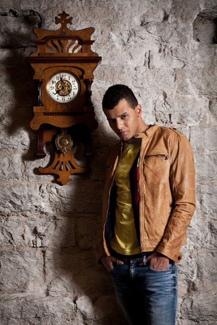 Raimondo Laikre